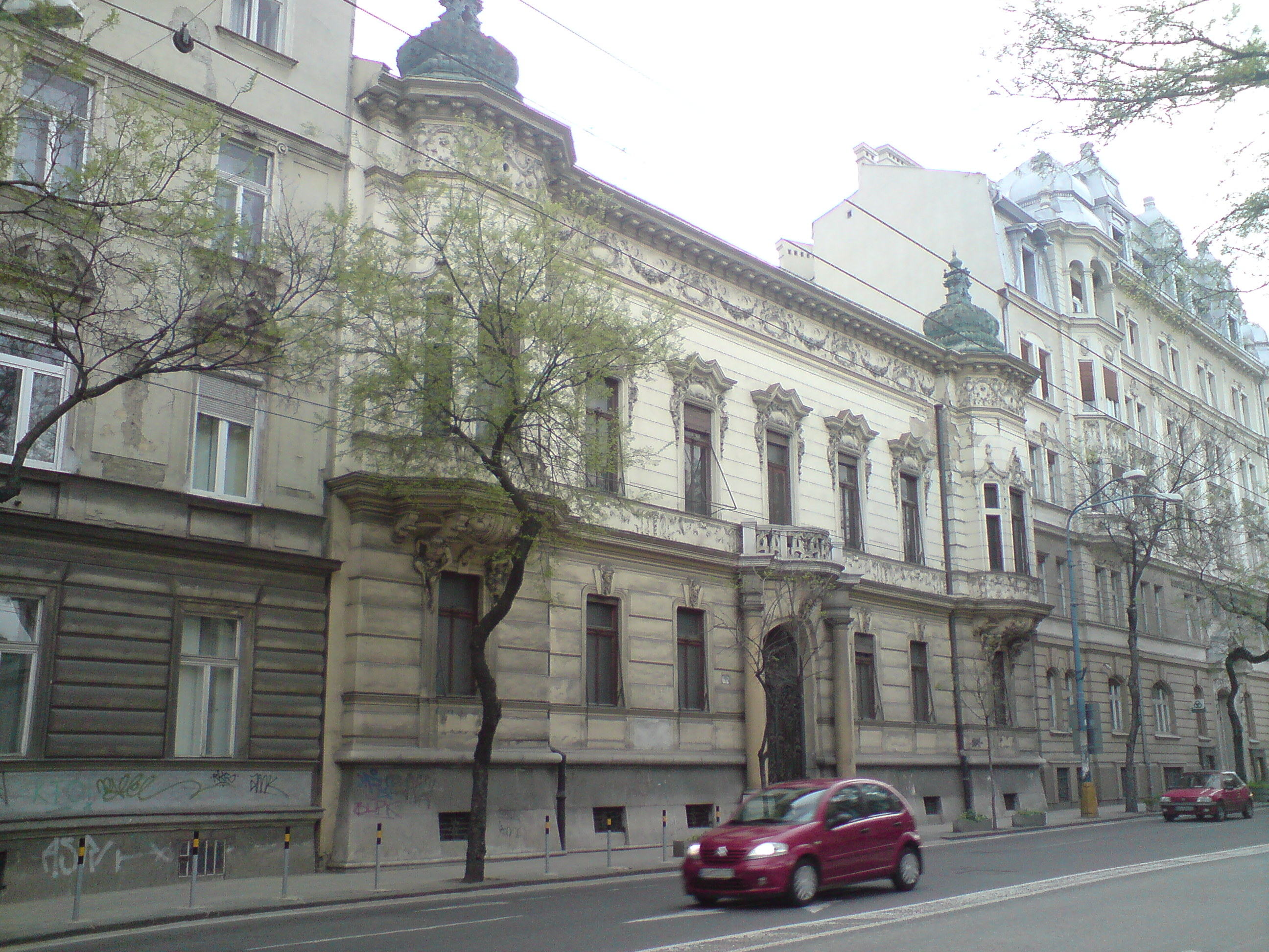 Pisztoryho palác, Štefánikova, Bratislava